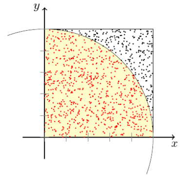 statistische Berechnung von pi